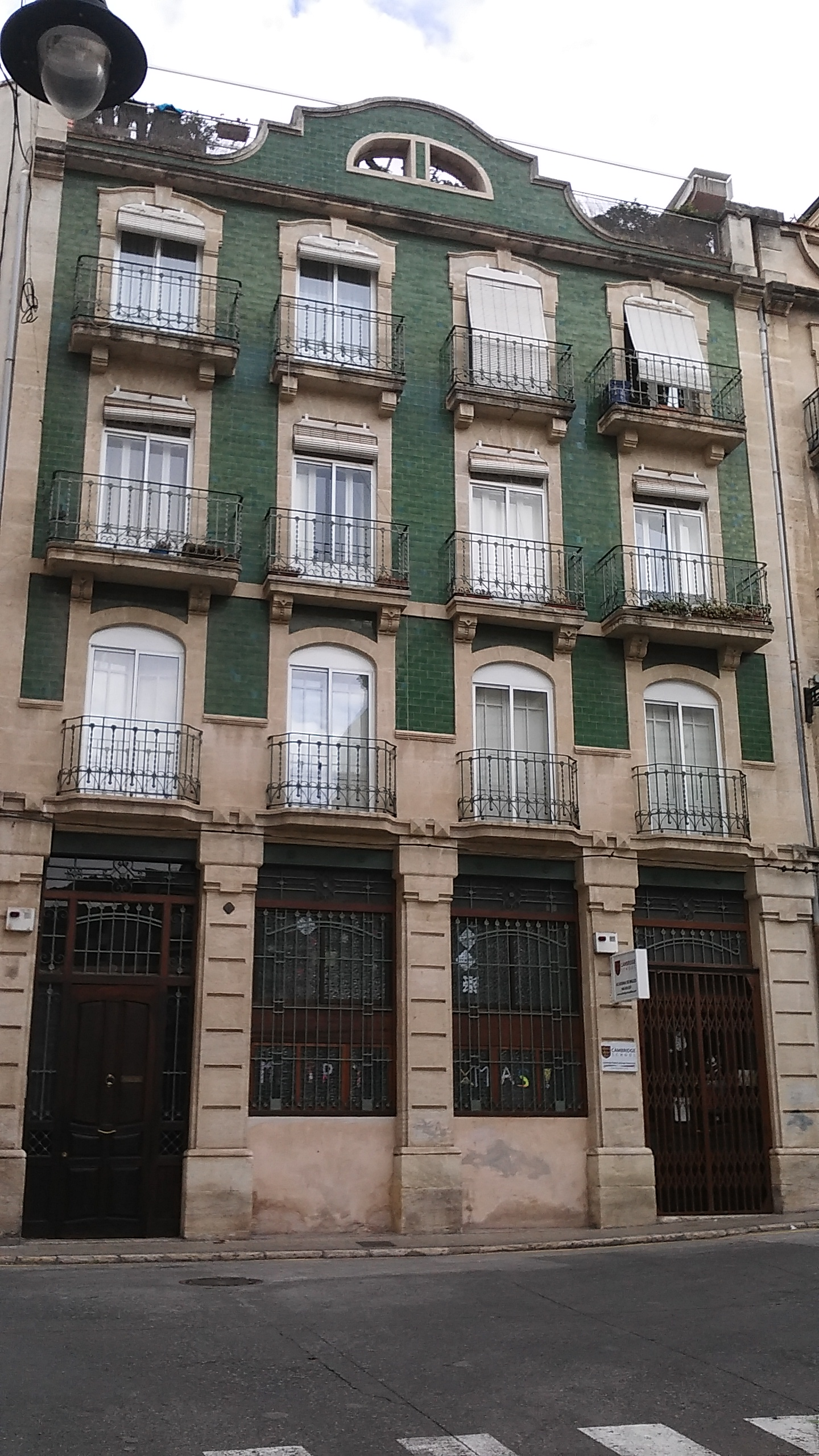 Alcoy-edificio en calle Bartolome Jose Gallardo número 1, en Alcoy